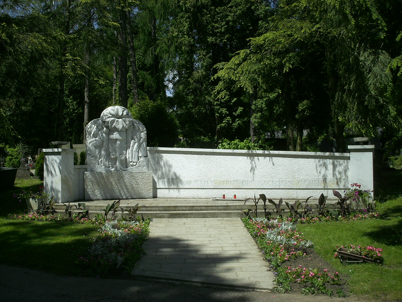 Mahnmal f. Feuerwehr und Rotes Kreuz am Städtischen Friedhof Kapfenberg/Österreich.